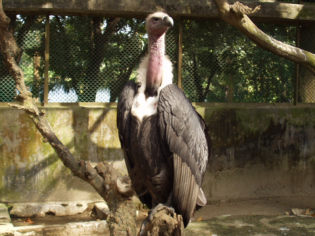 vulture, Dhaka Zoo. -mamun2a